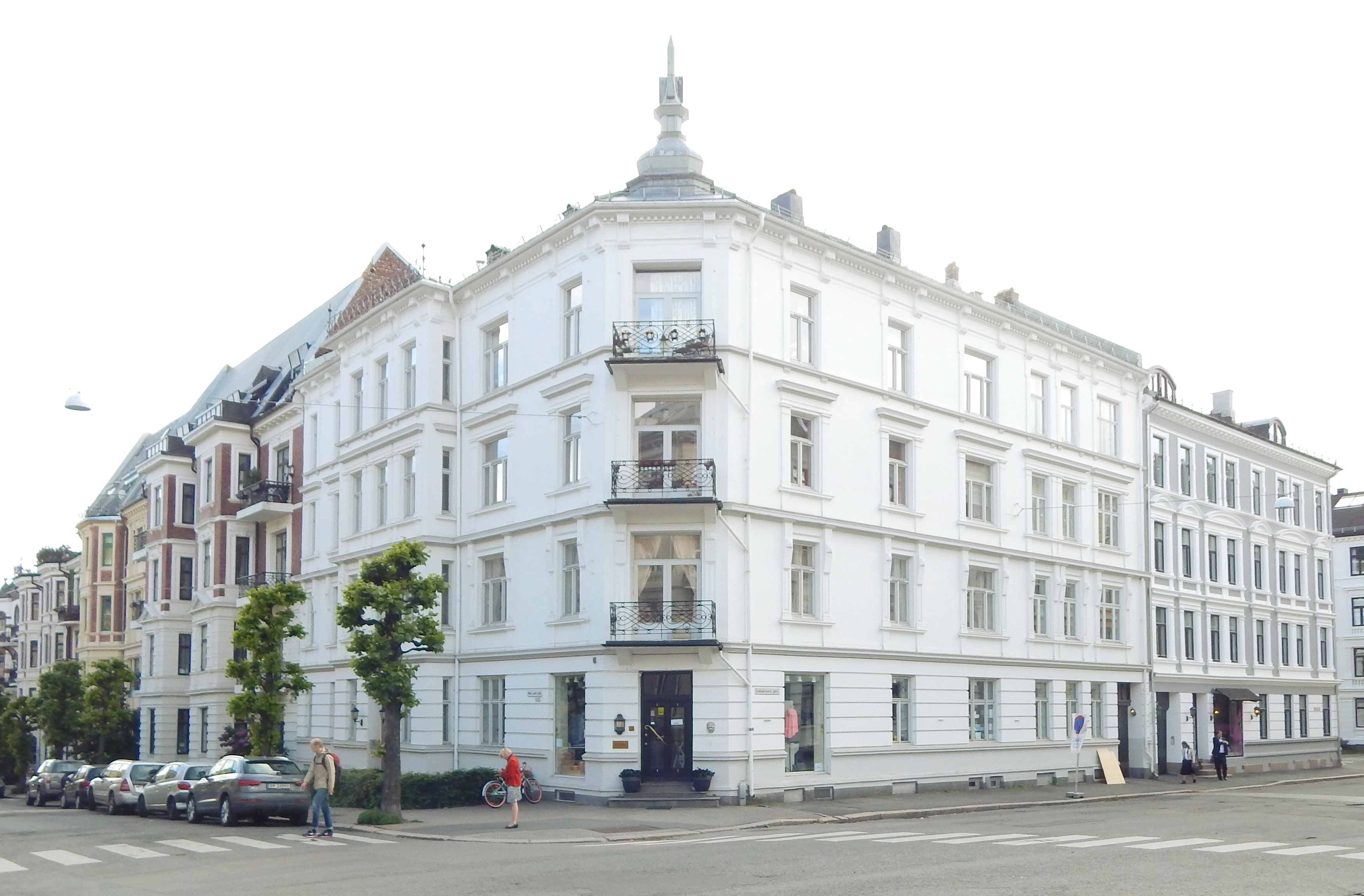 Niels Juels gate 50 (arkitekt: Adolf Agthe)